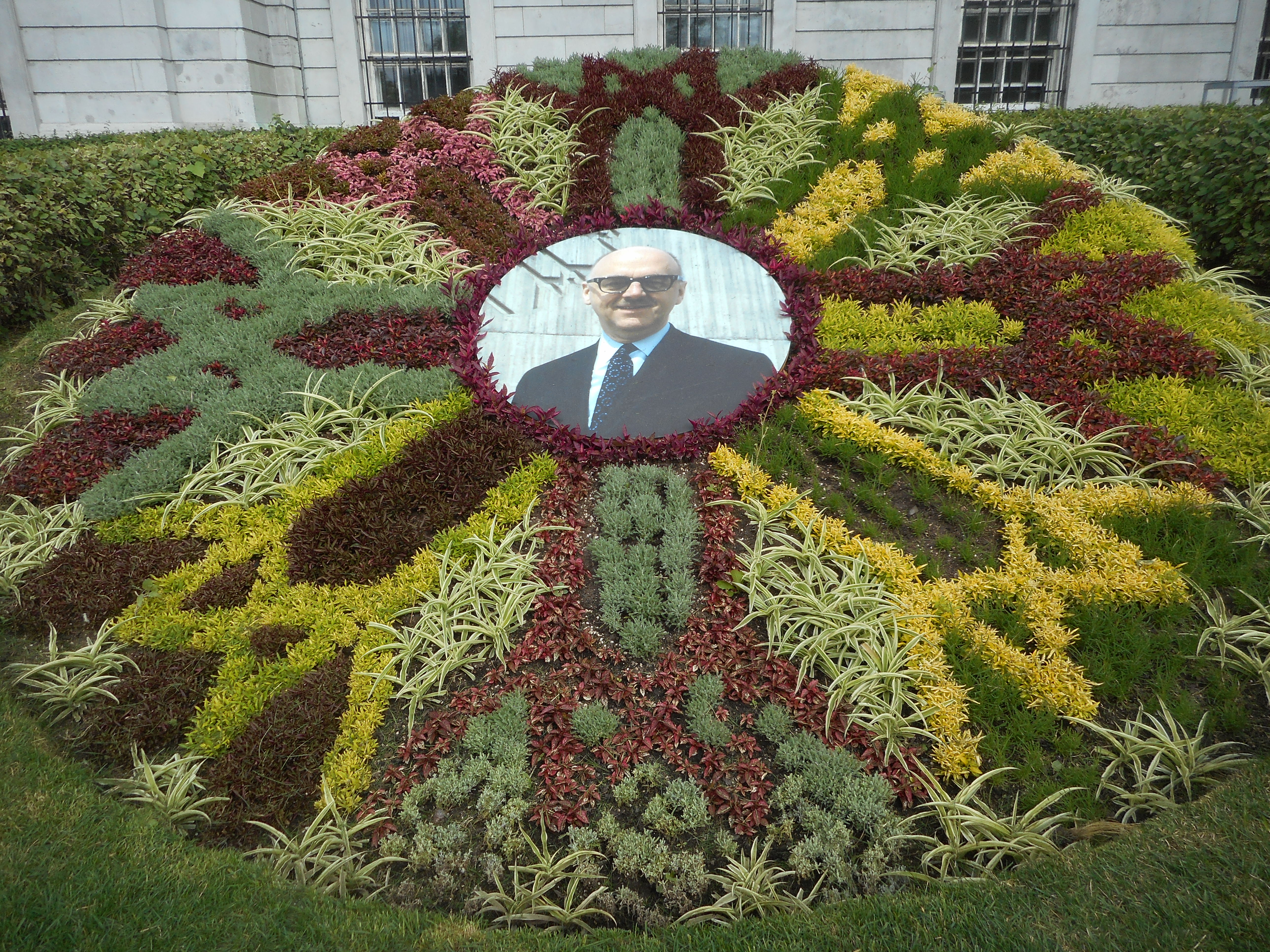 Hôtel de ville de Montréal